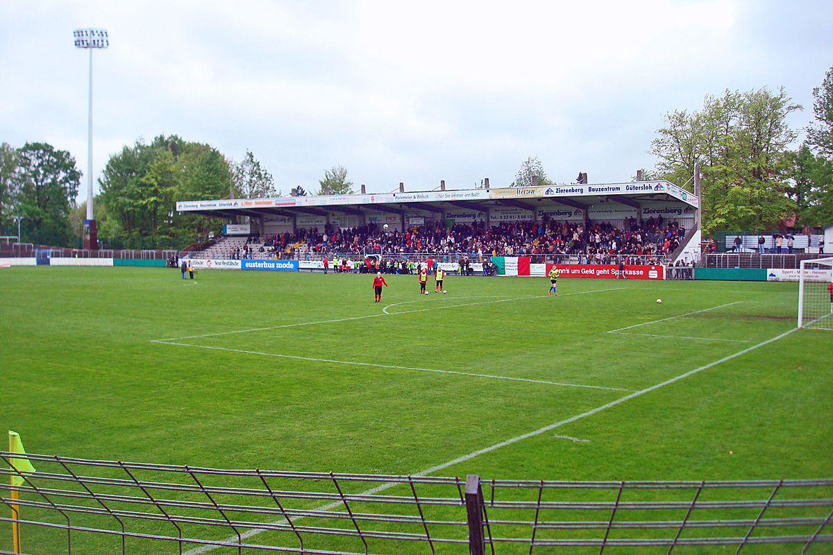 Heidewaldstadion Gütersloh, Blick auf die Sitzplatztribüne